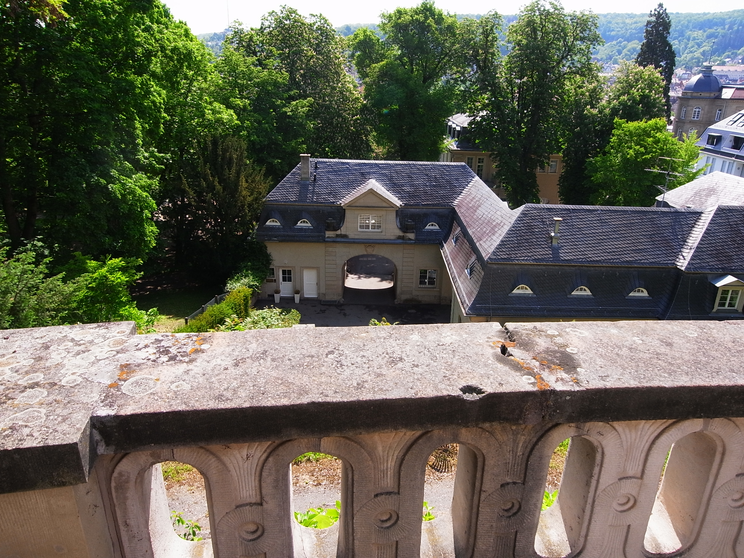 Blick zurück (Richtung Mörikestraße)